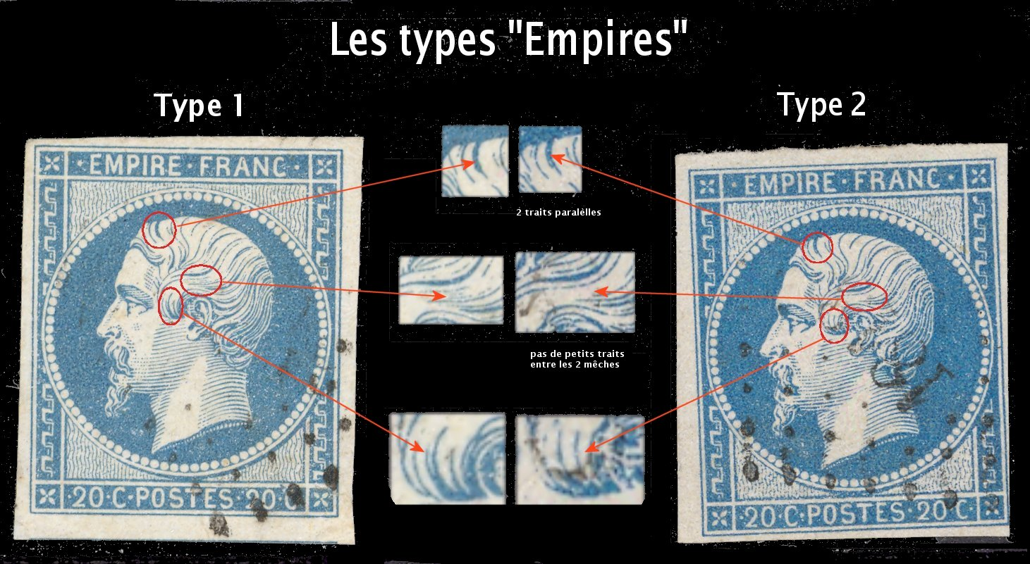 stamp France 1853 Empire Napoleon III / caractéristics off the two subtypes / France Napoléon III, Timbres série Empire : description des sous-types I (1853) et II (1860).